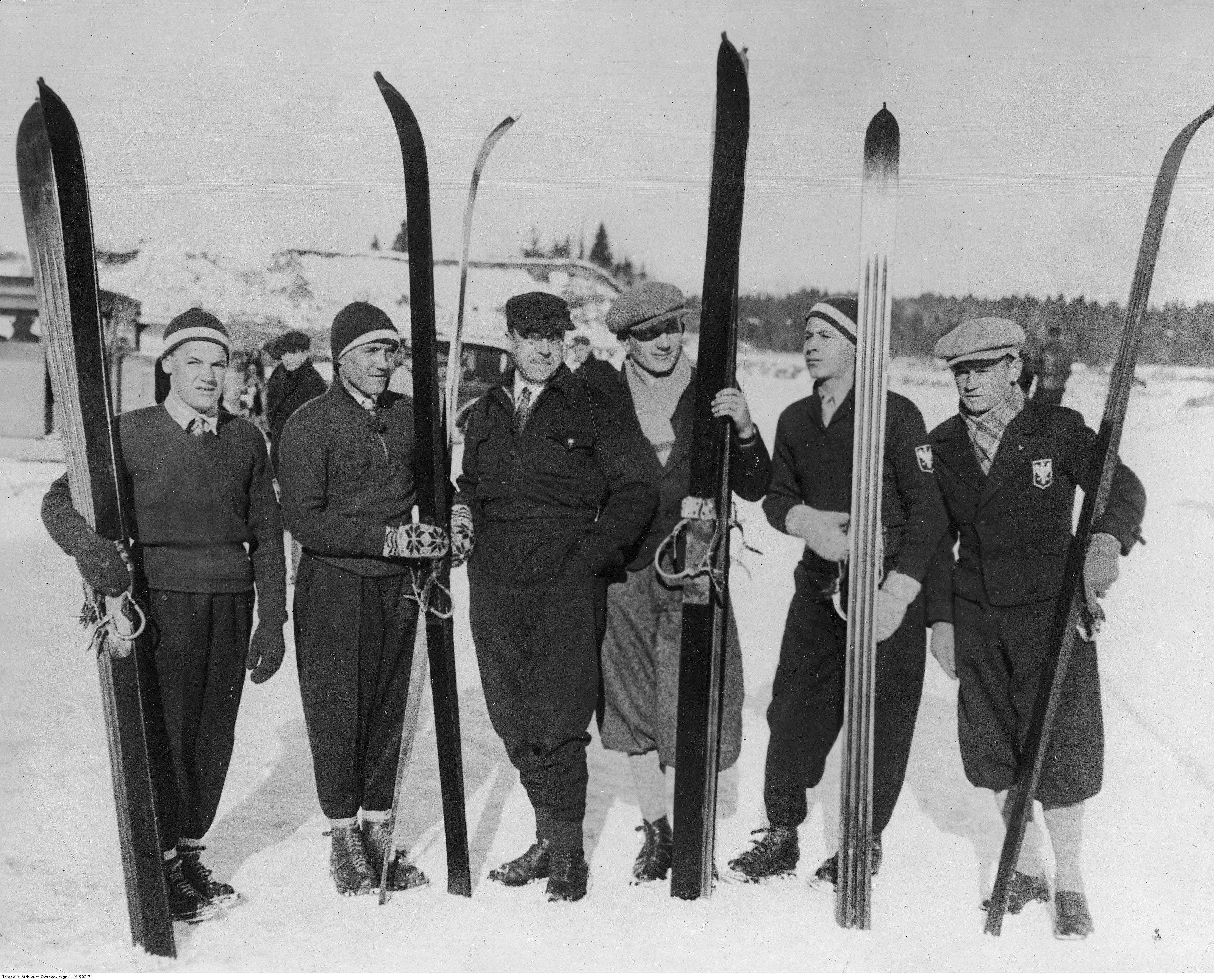 Zimowe Igrzyska Olimpijskie w Lake Placid. Polscy narciarze. Stoją od lewej: Andrzej Marusarz, Bronisław Czech, inżynier Jan Woyniewicz, Stanisław Skupień, Stanisław Marusarz i Zdzisław Motyka. 1932-02 (Koncern Ilustrowany Kurier Codzienny - Archiwum Ilustracji)